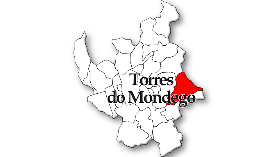 População